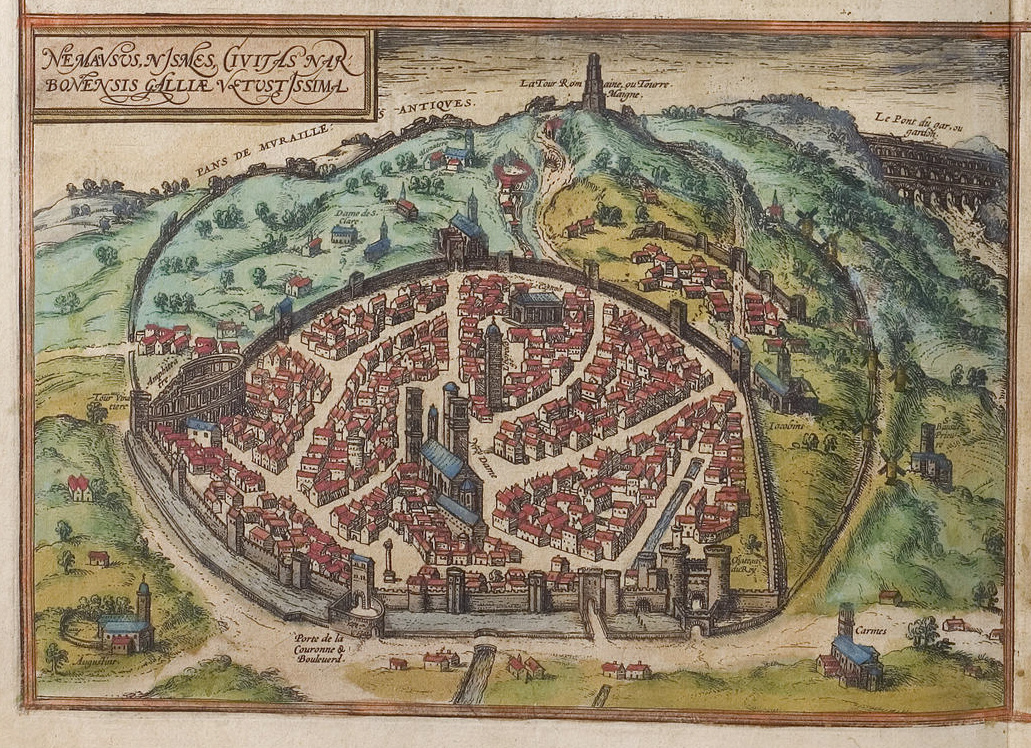 Nîmes